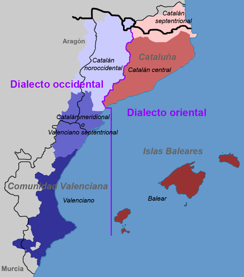 corrección del nombre político de la Comunidad Valenciana. La entidad "País Valenciano" legalmente no existe.